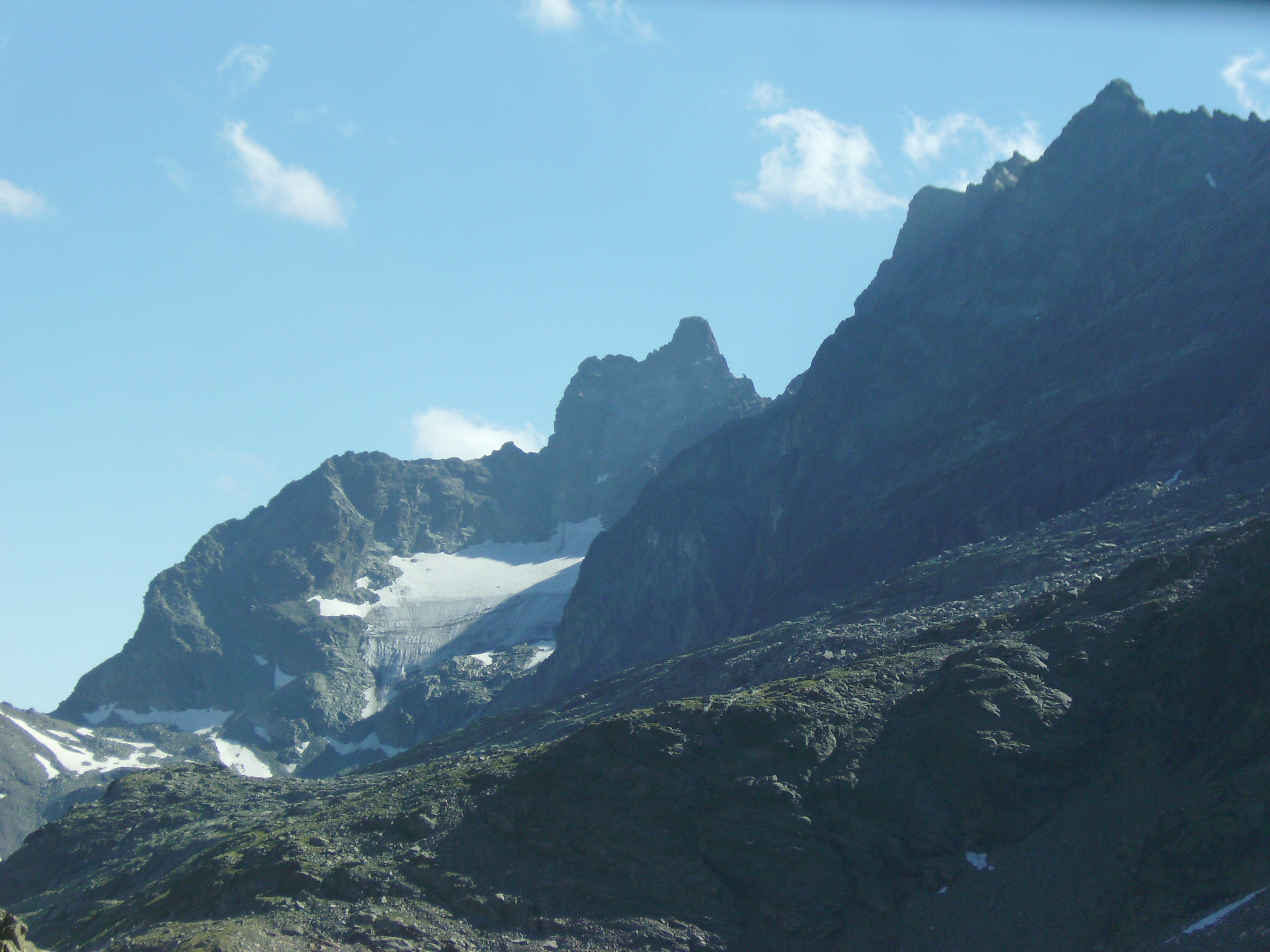 La Punta Cian dal rifugio Perucca-Vuillermoz